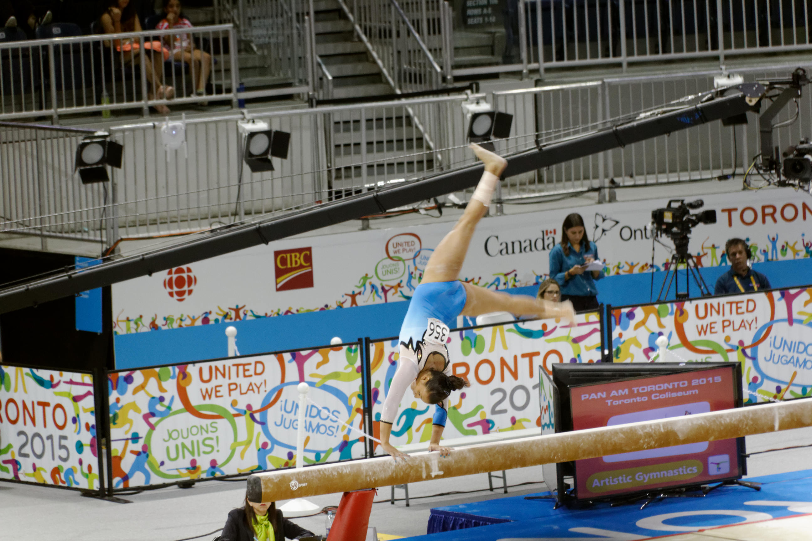 Paola Marquez Arenas (Venezuela) - Women's gymnastics at the 2015 Pan Am Games.